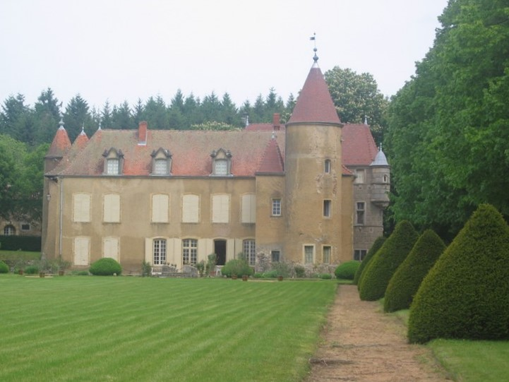 Chateau de l'Aubepin